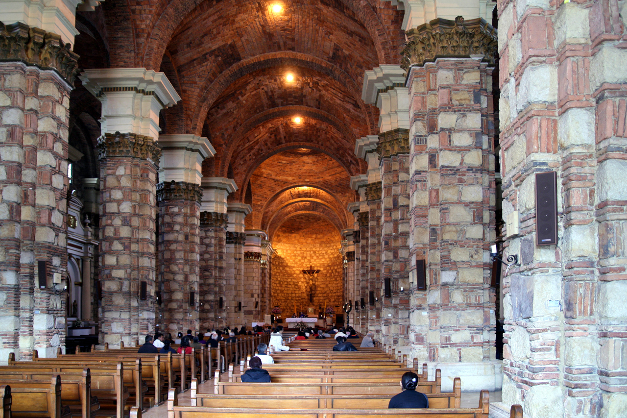 Catedral de Zipaquira (Colombie)